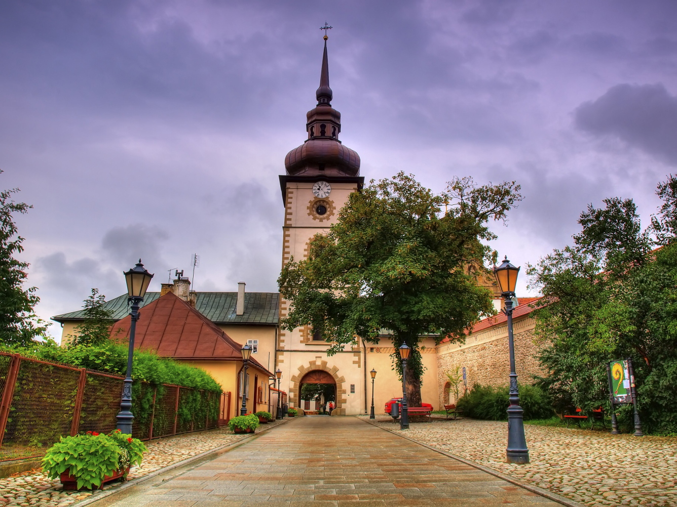 Brama wejściowa do Klasztoru Klarysek w Starym Sączu